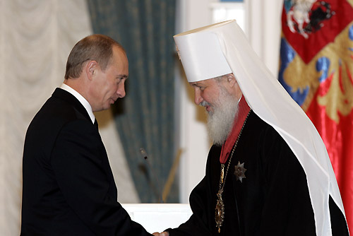 МОСКВА, КРЕМЛЬ. Церемония вручения государственных наград. За большой личный вклад в развитие духовных и культурных традиций и укрепление дружбы между народами орден «За заслуги перед Отечеством» II степени вручен митрополиту Смоленскому и Калининградскому Кириллу.